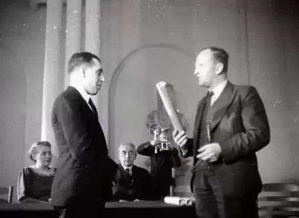 prijsuitreiking Lex van Delden Amsterdam.